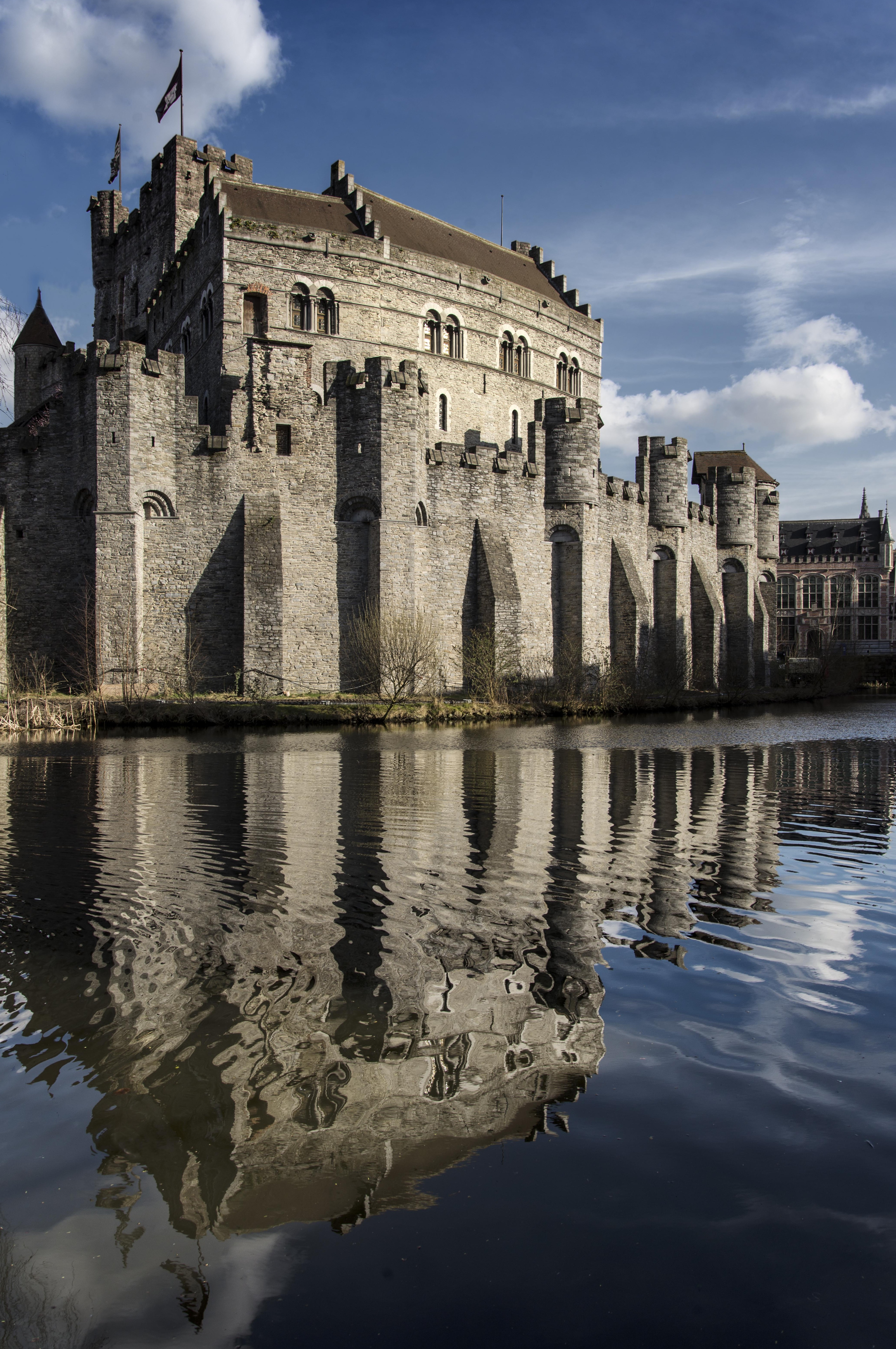 Het Gravensteen gezien vanuit Sint-Widostraat.